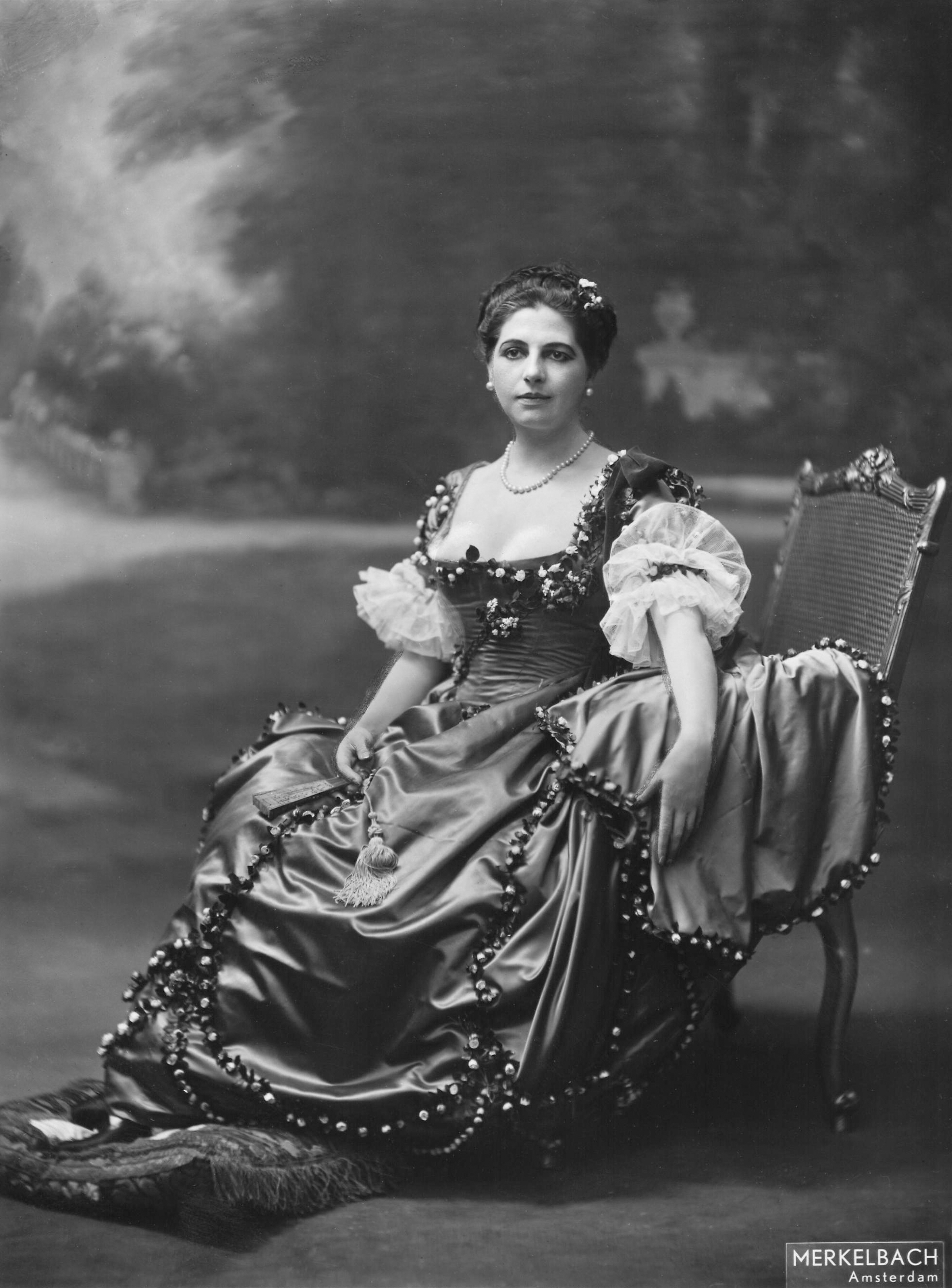 Mata Hari kooldruk 1915